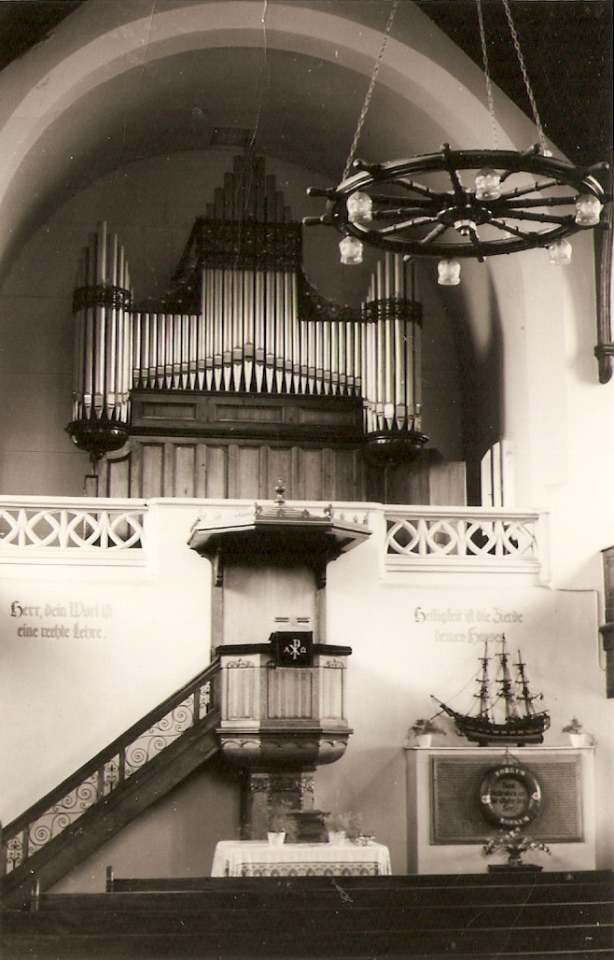 Orgel der Ev.-reformierten Kirche Borkum, Landkreis Leer, Ostfriesland, Niedersachsen, Deutschland